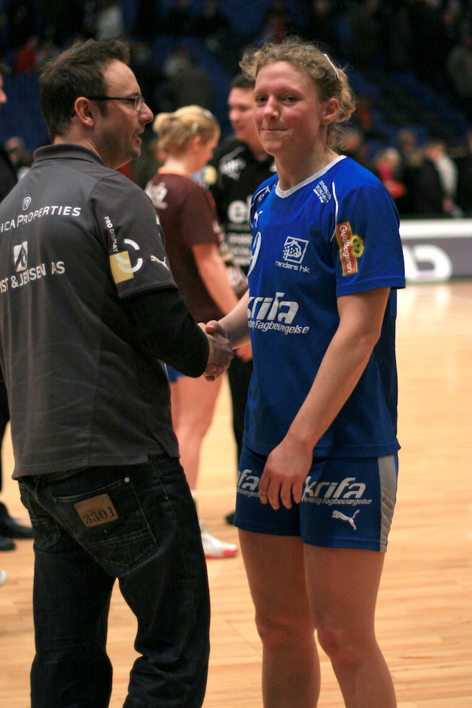 Håndboldspiller Katrine Fruelund, fra Randers HK